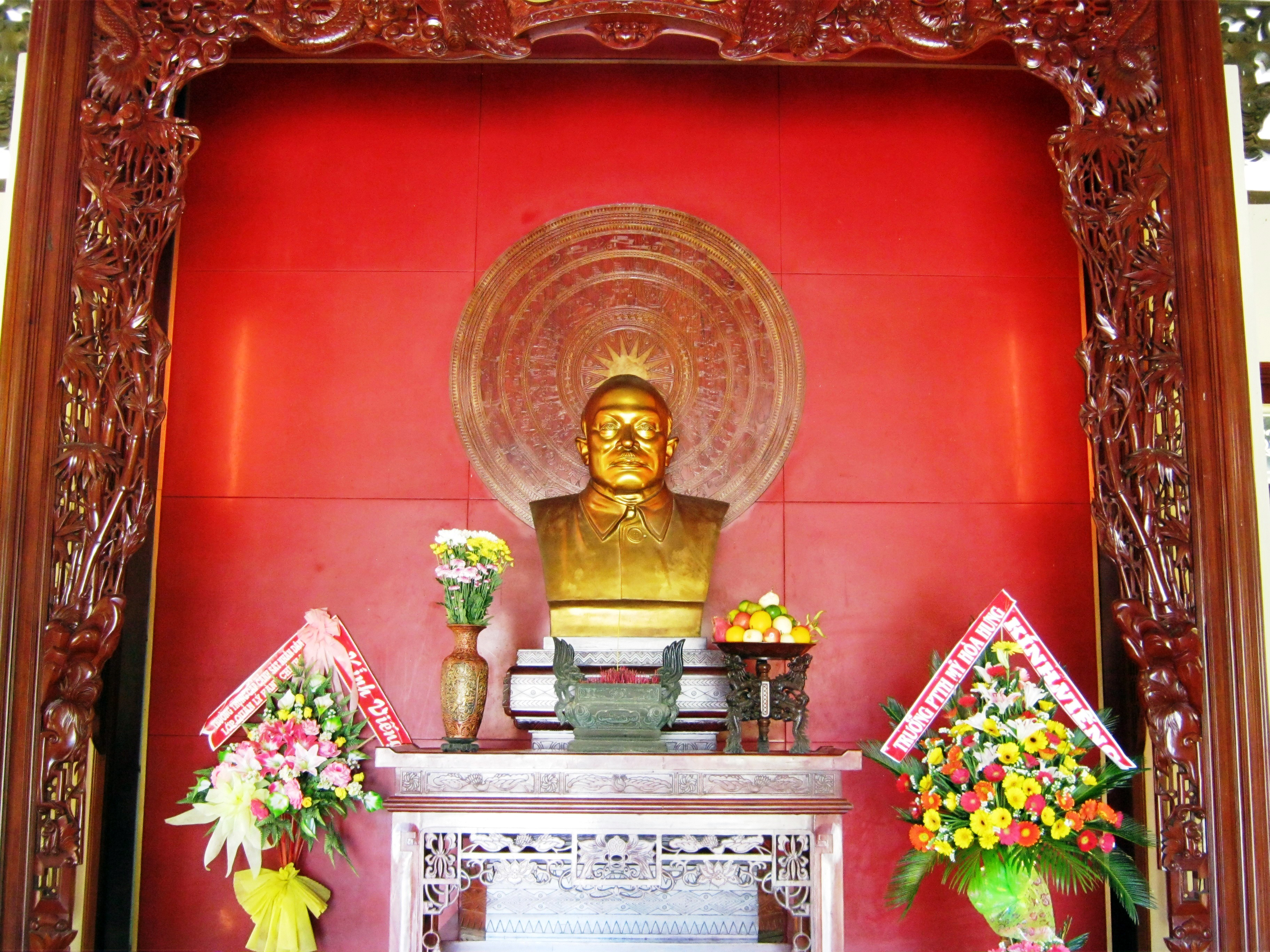 Tượng bán thân Chủ tịch Tôn Đức Thắng trong đền thờ ông; trên cù lao Ông Hổ, thuộc xã Mỹ Hòa Hưng, thành phố Long Xuyên, tỉnh An Giang, Việt Nam.